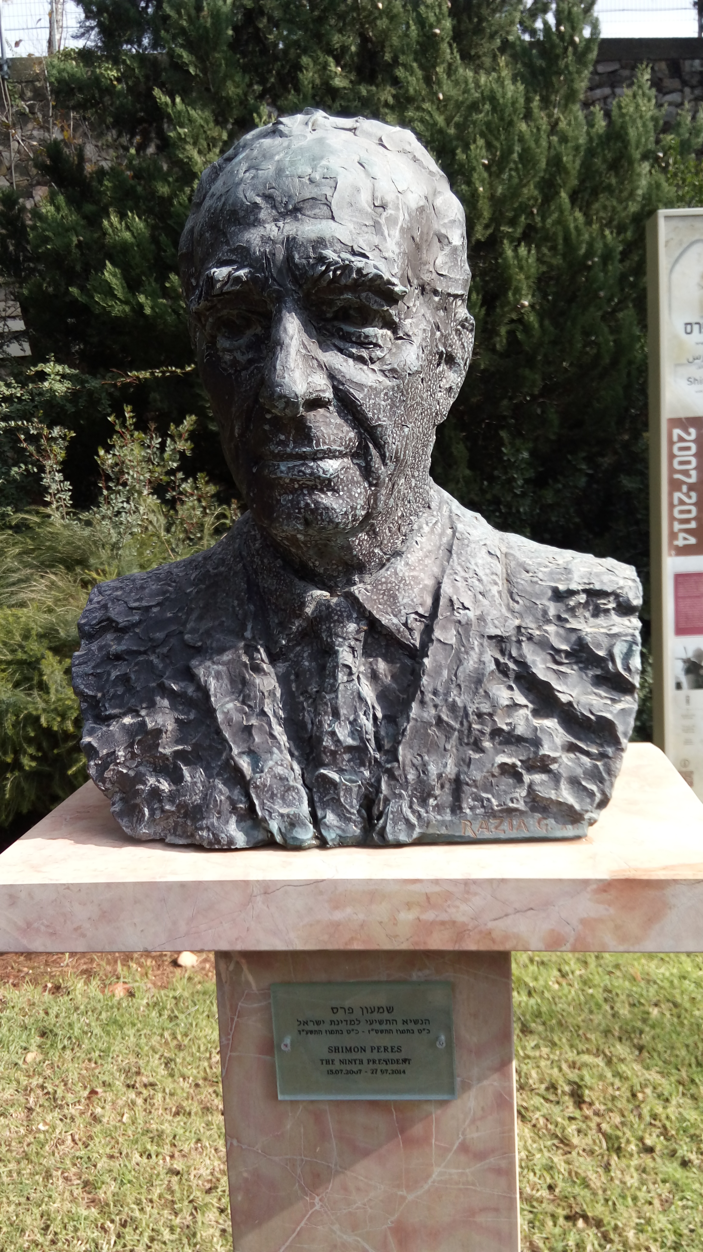 פסלו של שמעון פרס בבית הנשיא